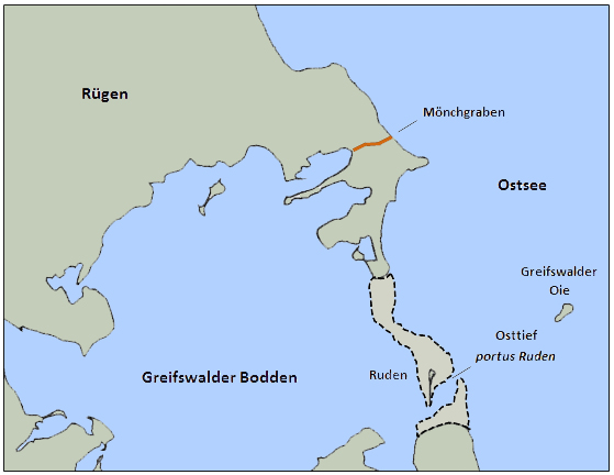 Mögliche Landverbindung zwischen Rügen und dem Ruden im 12. und 13. Jahrhundert anhand der Tiefenverhältnisse auf der Boddenrandschwelle. Im Norden ist der Mönchgraben als Verteidigungswall gegen Angriffe von südlicher Richtung dargestellt.